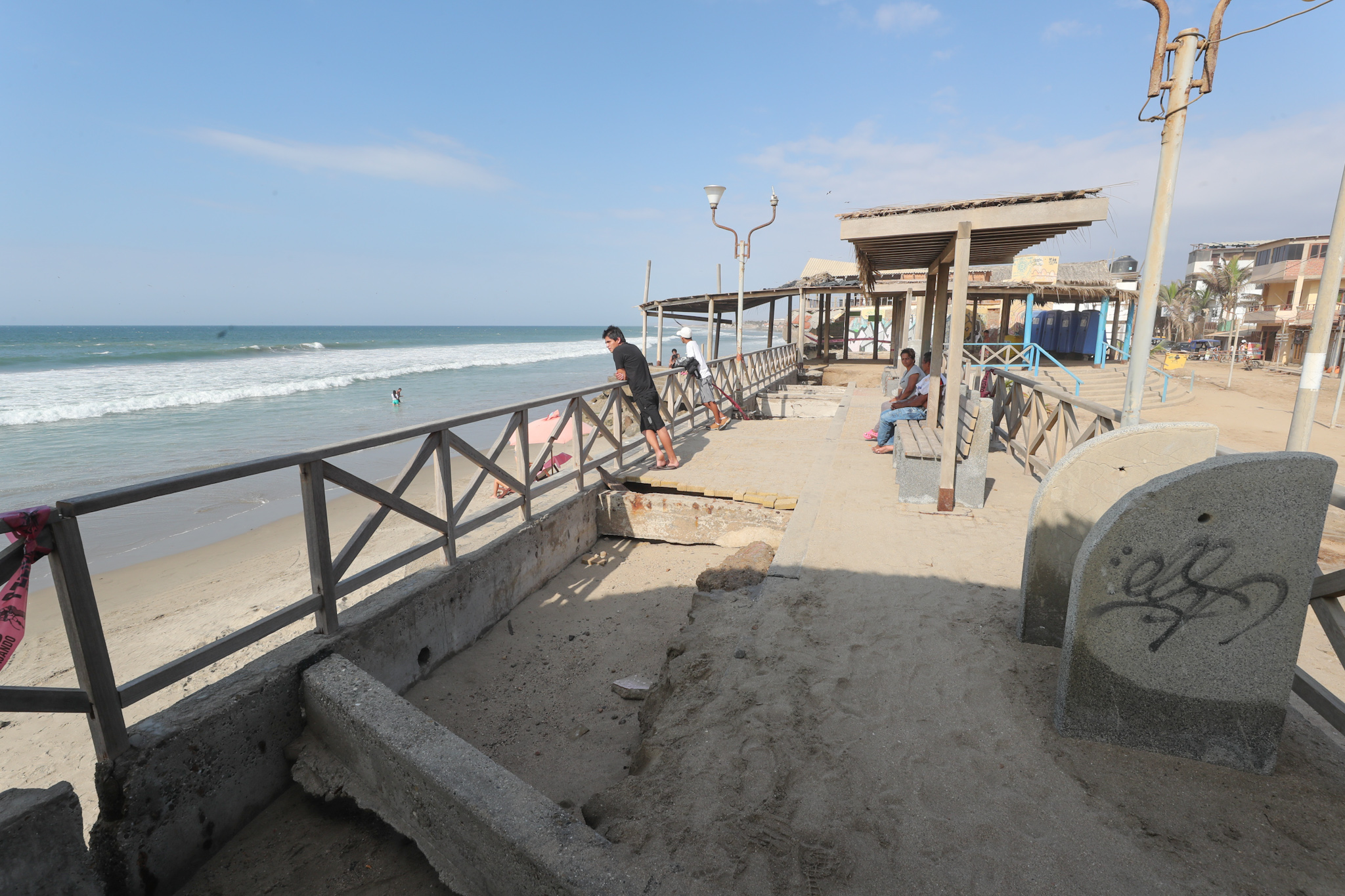 MINISTRO DE DEFENSA INSPECCIONÓ BALNEARIO DE MANCORA